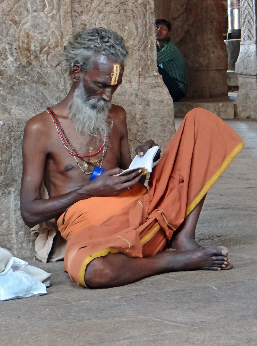 Dévot dans le temple de Srirangam (Ranganath Swami) à Tiruchirapalli (Trichy) Le temple de Srirangam est une véritable cité religieuse, dont l'édification a commencé au Xème siècle. Le sanctuaire dédié à Vishnu (golden temple) est au centre des bâtiments, c'est la partie la plus ancienne. Srirangam est le premier des cent huit sanctuaires du dieu Vishnu (appelé ici : Ranganatha, qui est la forme de repos de Vishnou). C'est le plus vaste temple avec 156 hectares et le plus célèbre. Le temple est constitué de sept enceintes dominées par 21 gopuram(s) (portes d'entrée monumentales). Il comprend de nombreuses boutiques, bassins, mandapa(s) et petits temples. La partie centrale (au-delà de la 6ème enceinte) et le sanctuaire sont réservés aux hindous. Article de Wikipedia sur le temple de Srirangam Le site officiel du temple